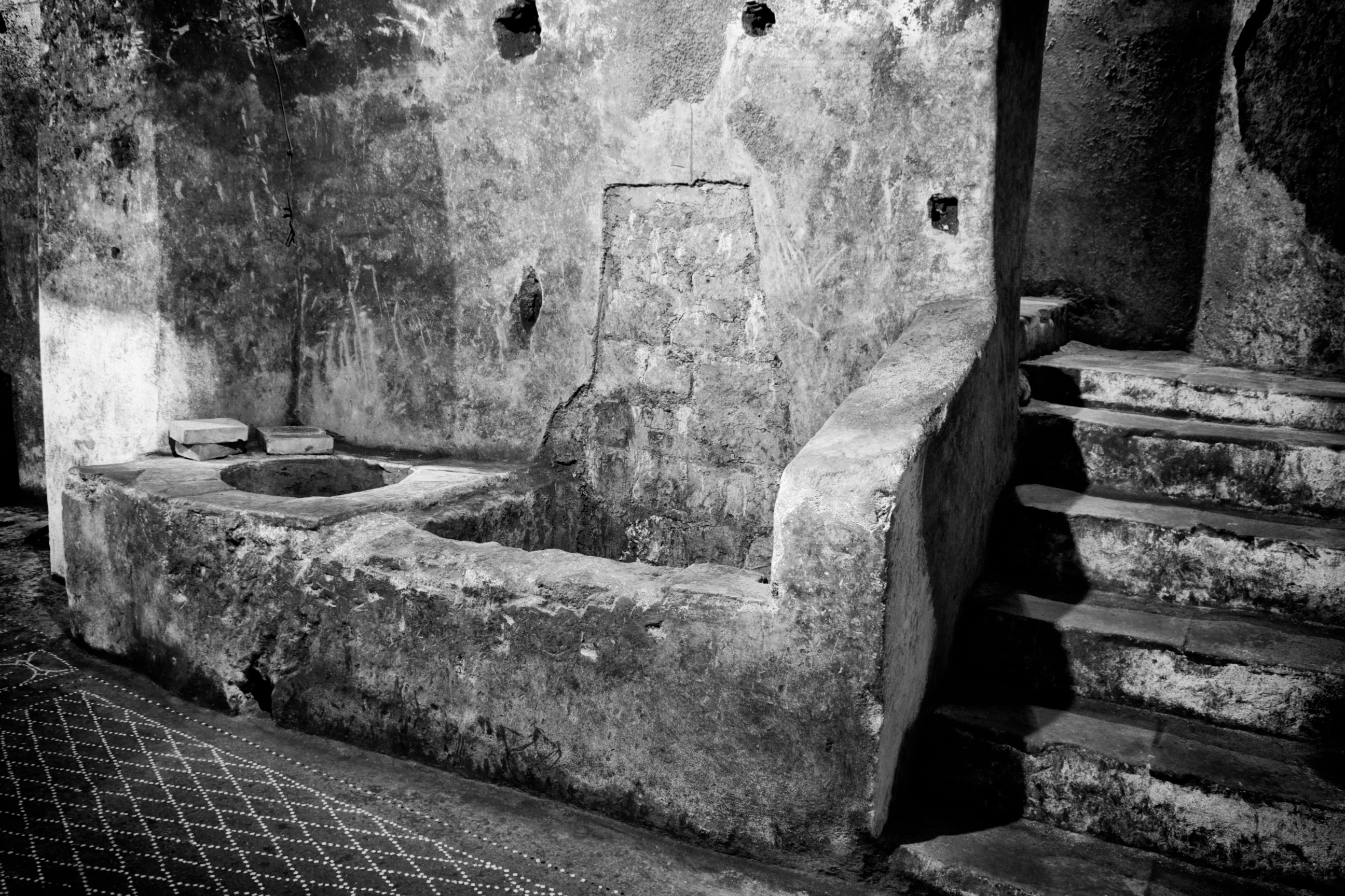 Domus Confuleius - Interno Sala 1 This is a photo of a monument which is part of cultural heritage of Italy.